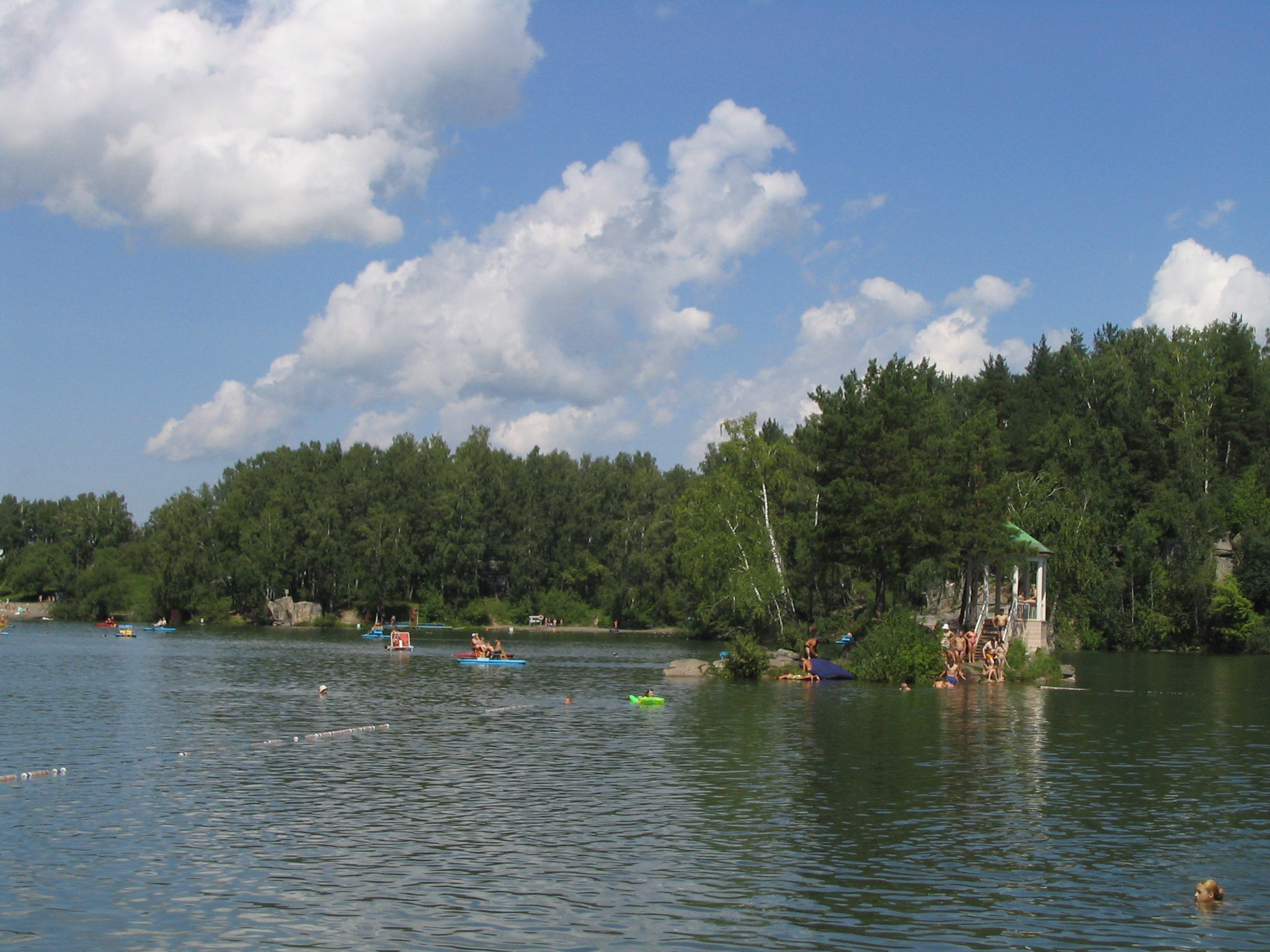 Aya Lake, Altay, Siberia. Оз. Ая, Алтайский край